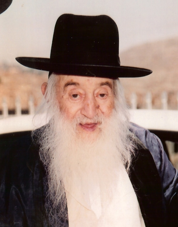 הרב נתן מאיר וכטפוגל